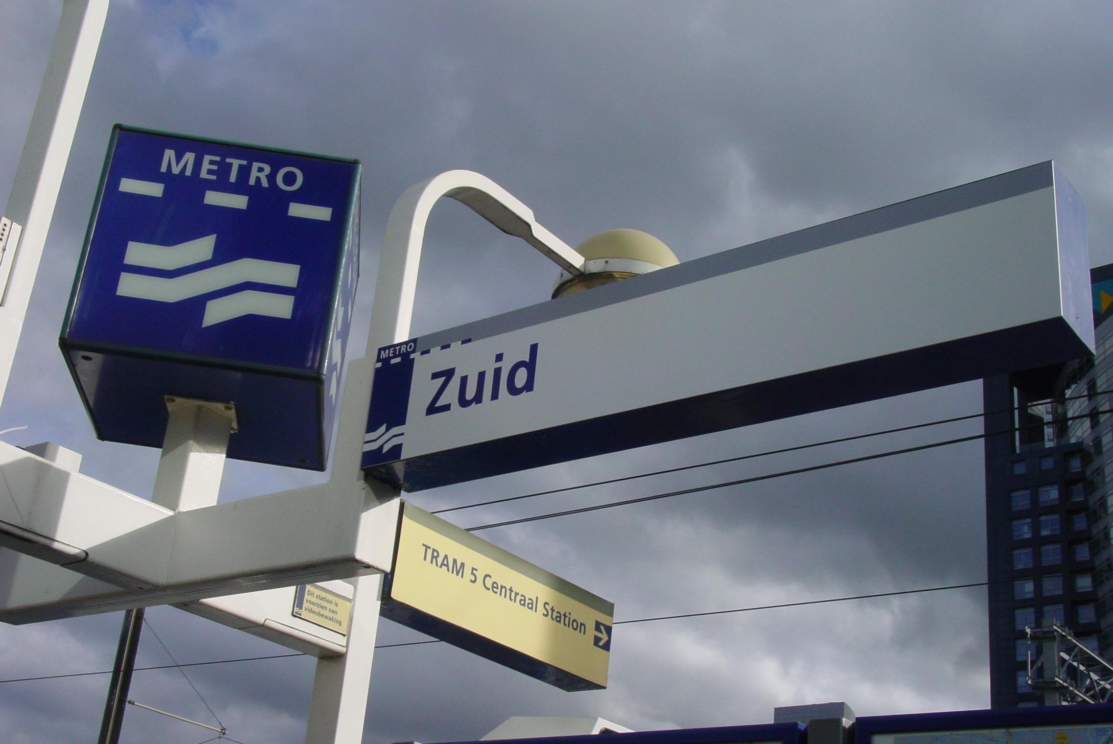 Metrostationsbord op Station Amsterdam Zuid.